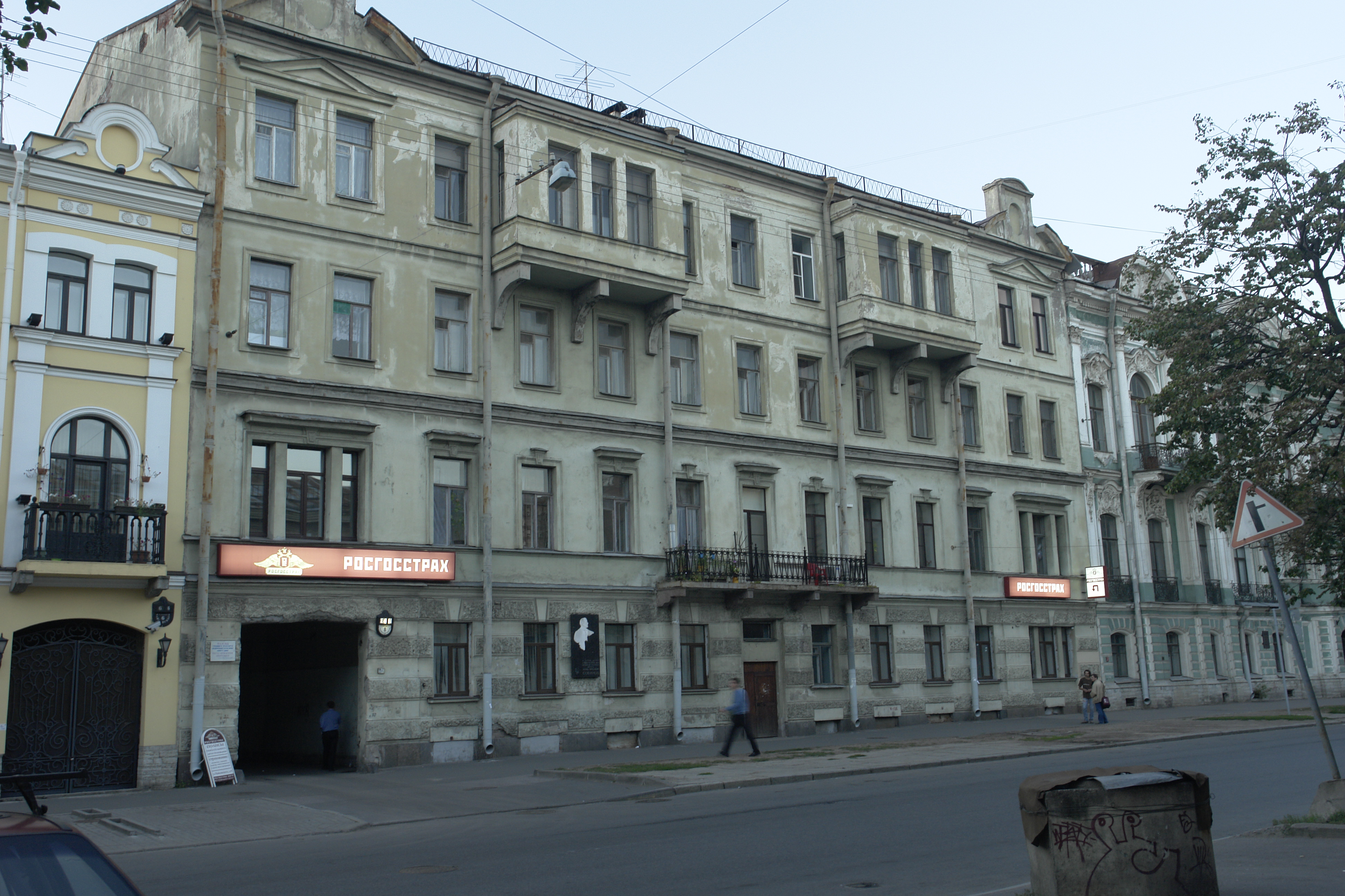 Чайковского, дом 8 (доходный дом Куракиной). Дом с мемориальной табличкой "В этом доме с 1915 по 1929 жил великий русский певец Леонид Витальевич Собинов". Табличка крупным планом: image:Мемориальная_табличка_Собинова.jpg.